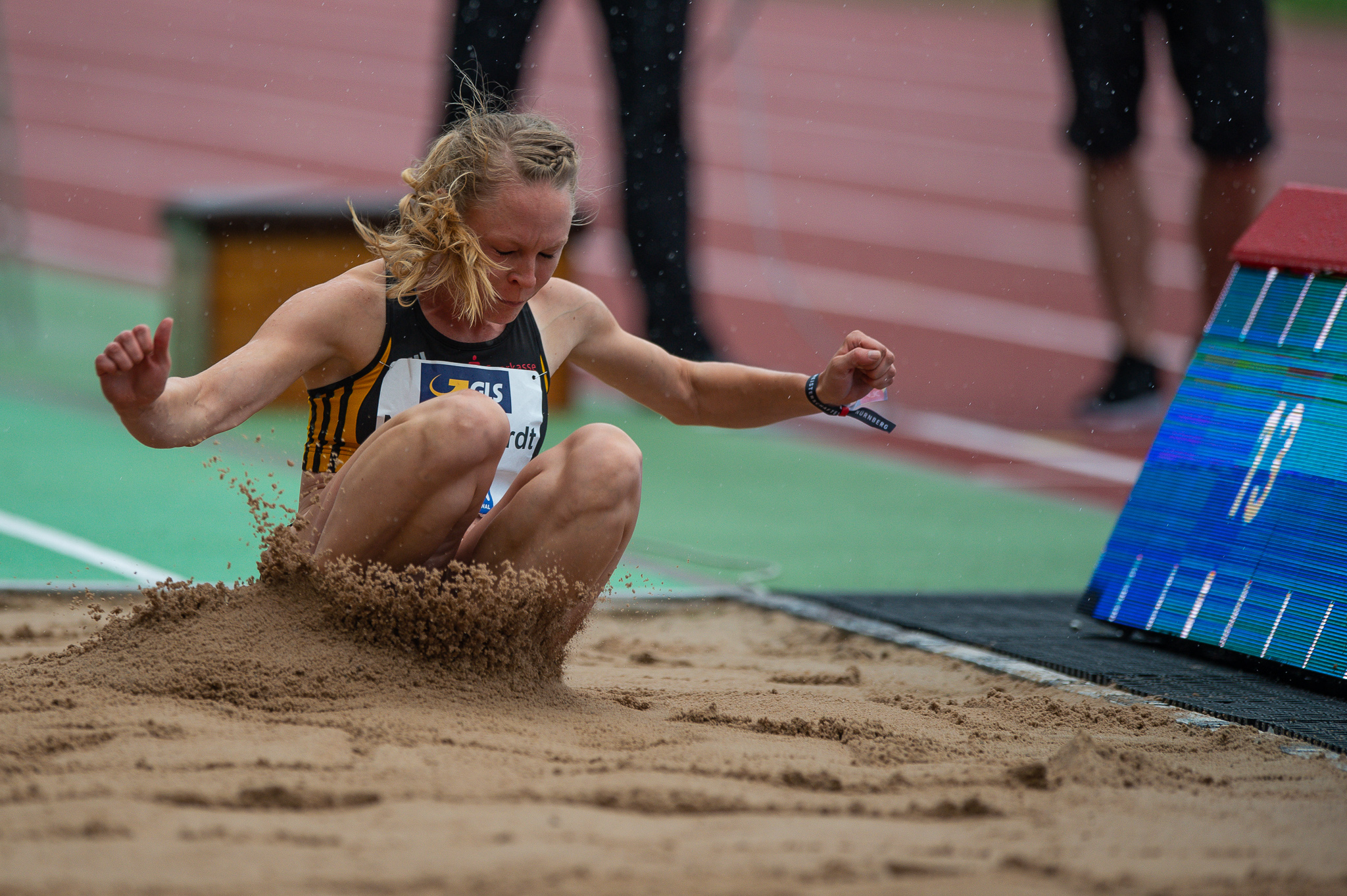 DLV,Deutsche Leichtathletik Meisterschaften 2018,Deutscher Leichtathletik-Verband,Dreisprung,LG Göttingen,Max-Morlock-Stadion,Neele Eckhardt,triple jump